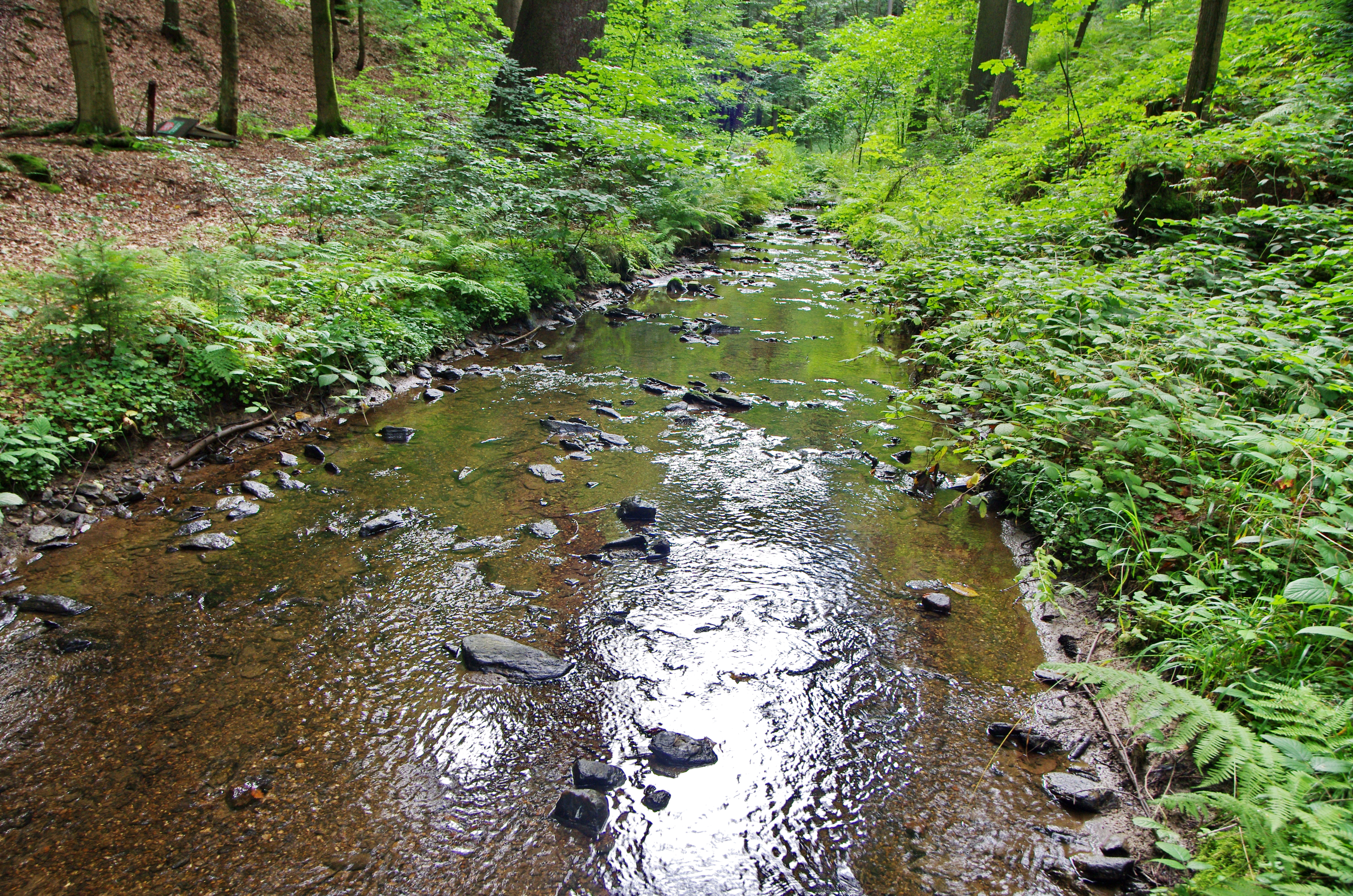 Dolinský potok, přítok Svatavy, pod hradem Hartenberg, okres Sokolov